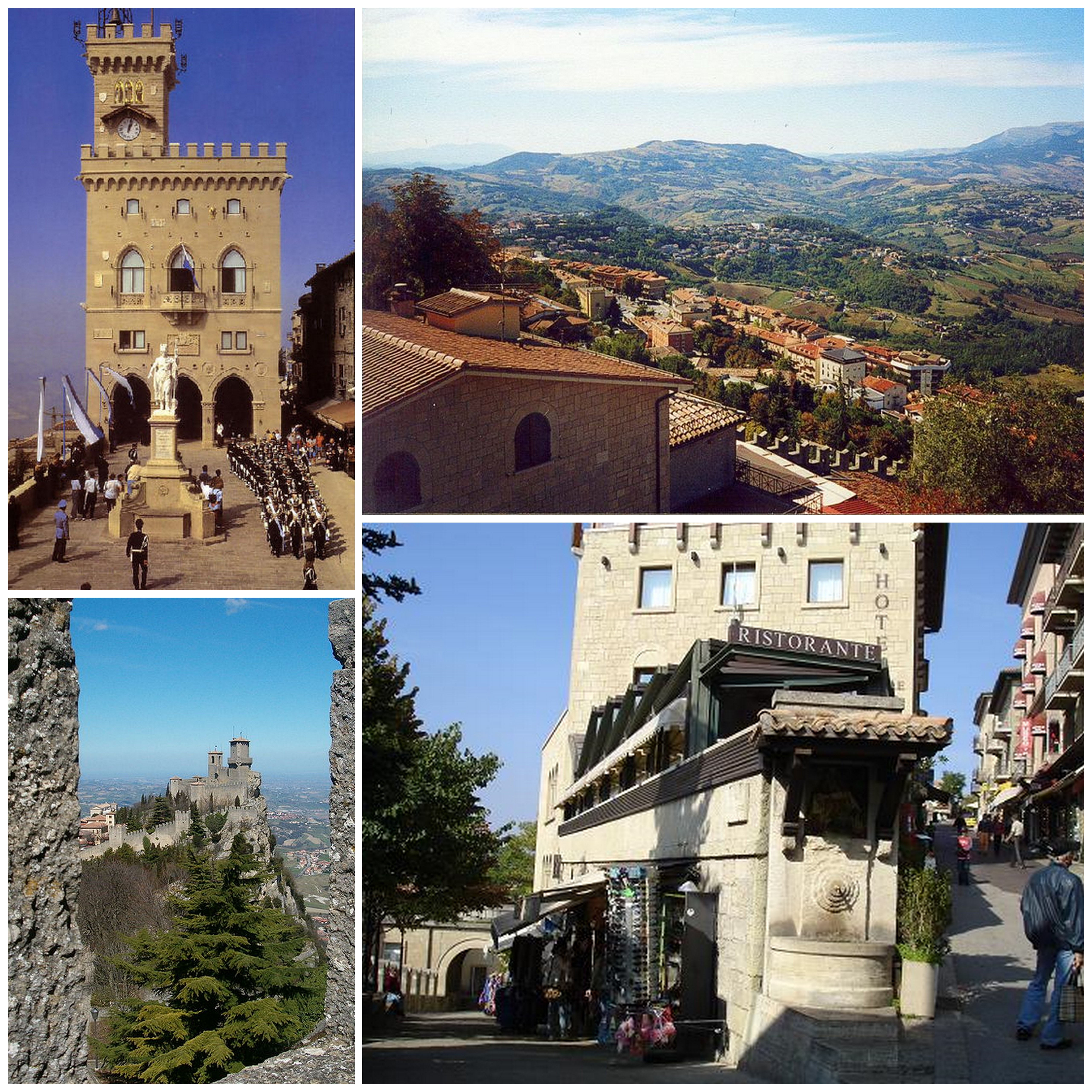 Collage di varie foto di San Marino